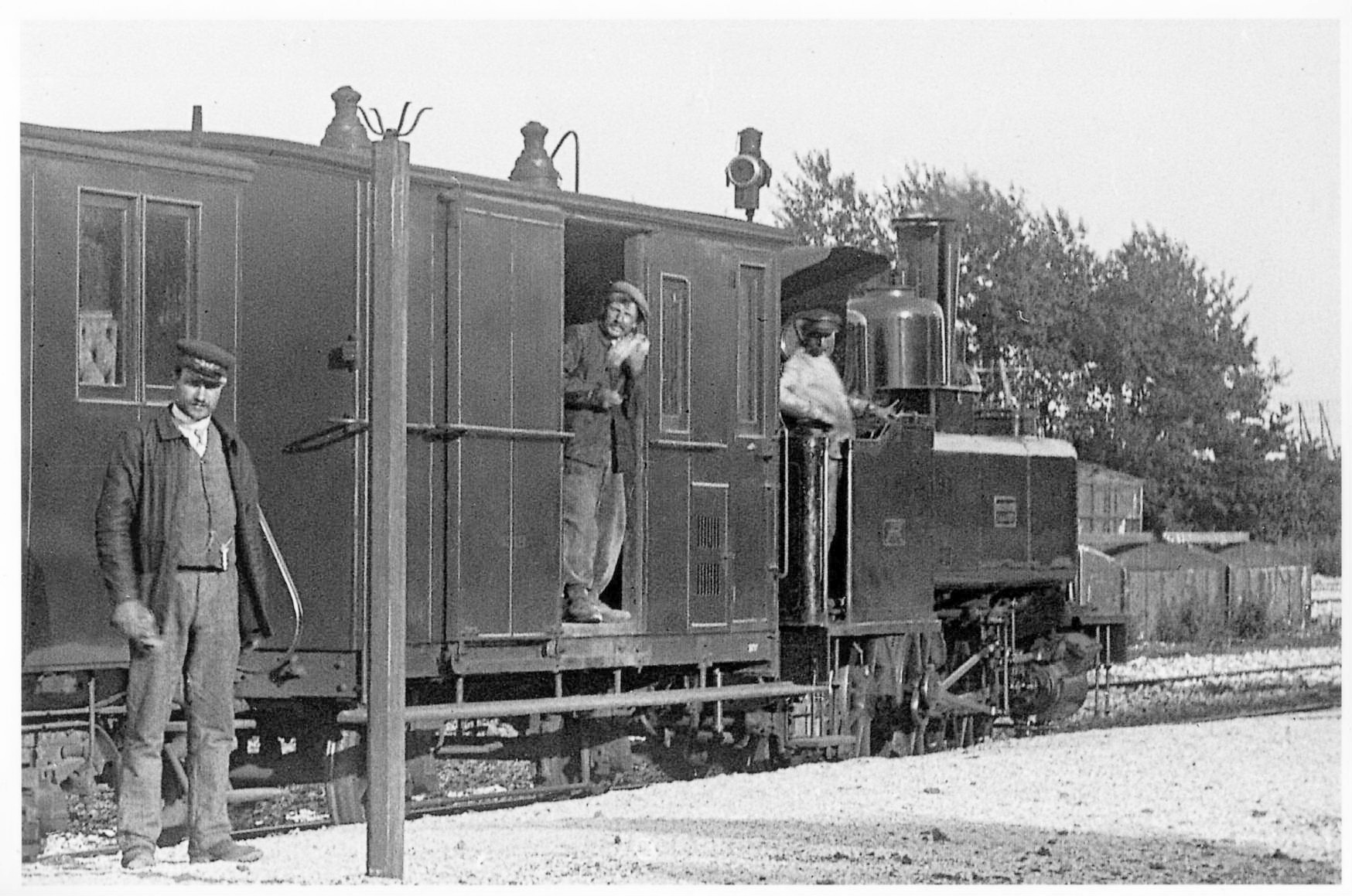 Train du chemin de fer secondaire Ligne Estrées-Saint-Denis - Froissy - Crèvecœur-le-Grand à Crèvecoeur le Grand (Oise)